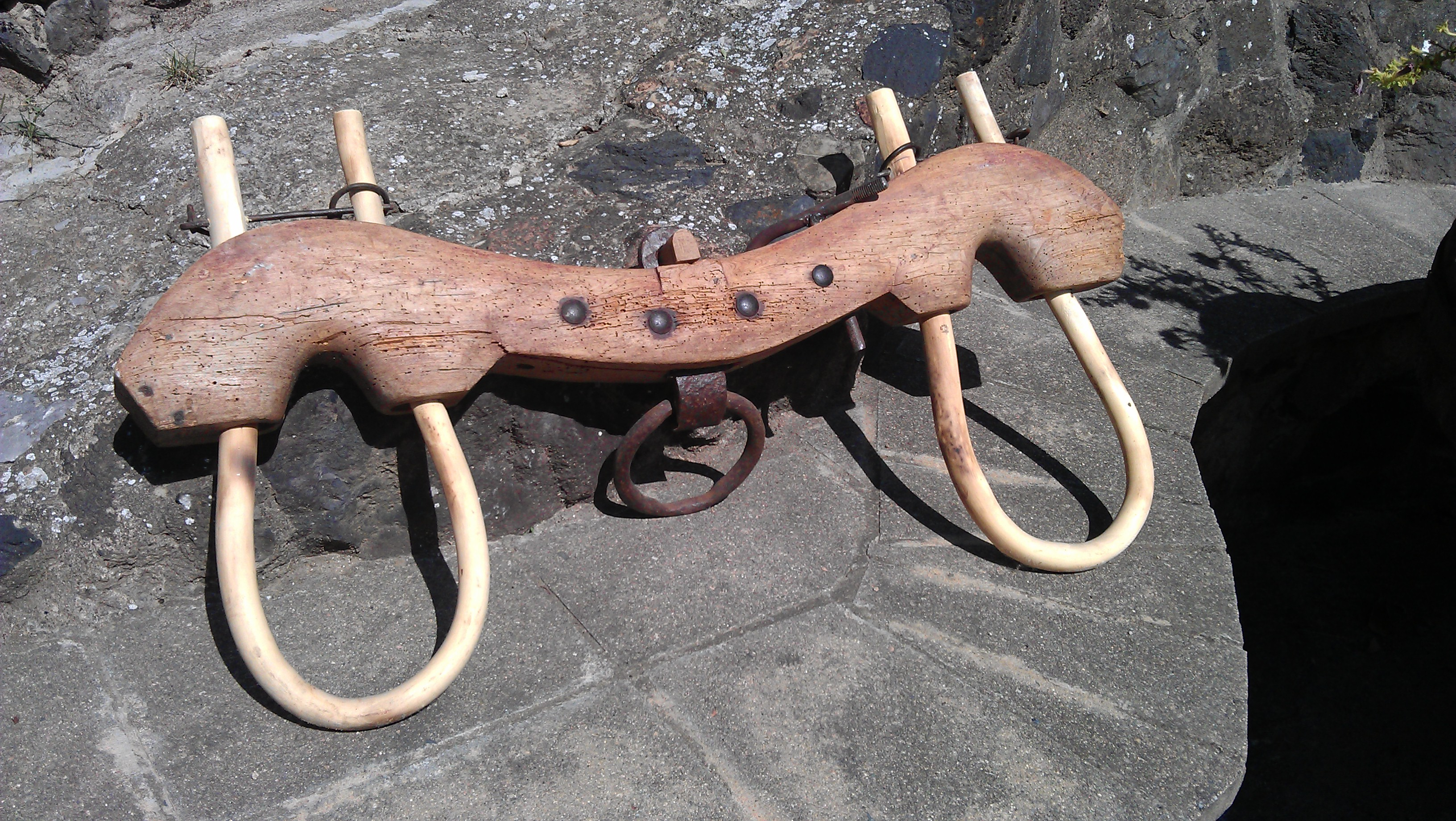 Joch